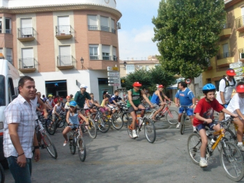 Fiesta del Día de la Bicicleta, en la localidad de Cúllar Vega (Granada, España)